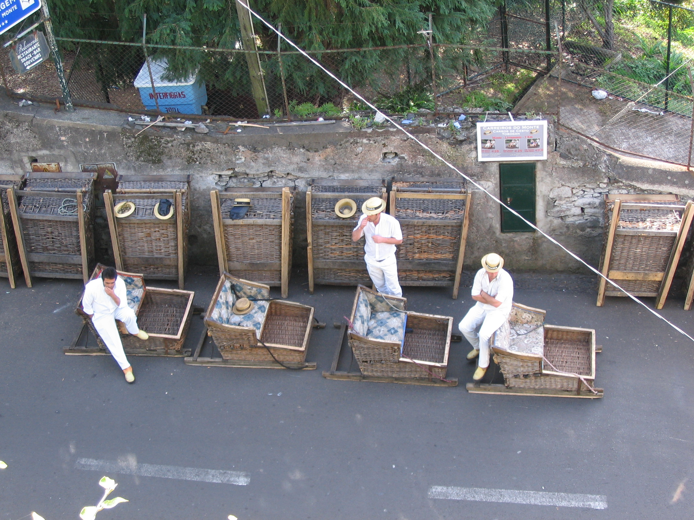 Indulni kész tobogánok a Miasszonyunk temploma alatti utcában (Monte, Madeira)